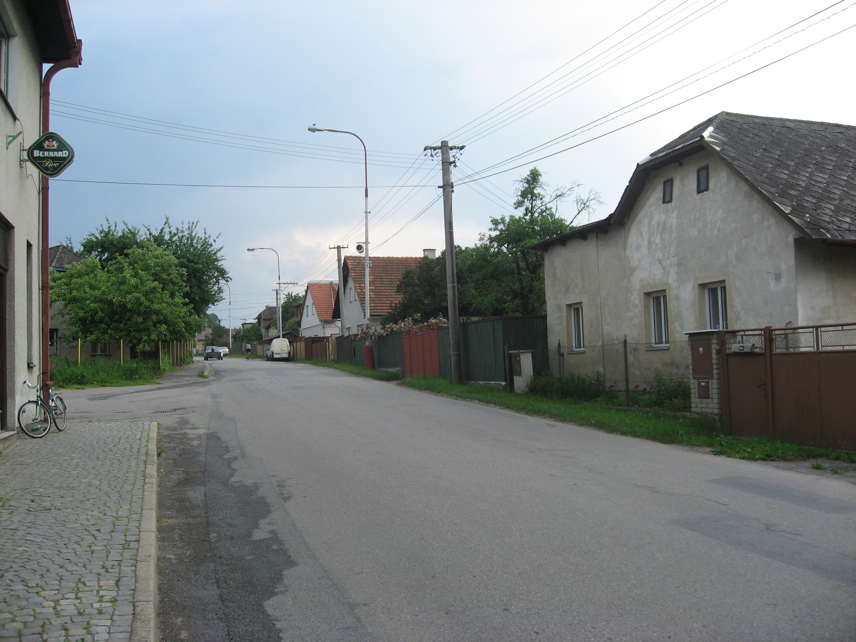 Čejov